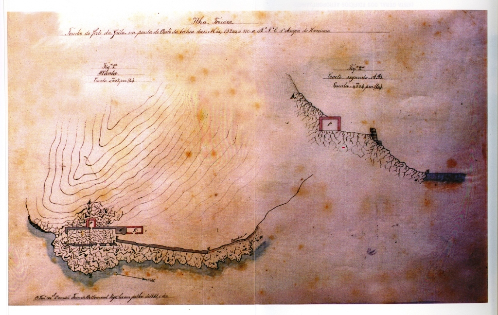 "Tombo do forte da Greta, na ponta do Oeste da bahia das Móz...", Ilha Terceira (Açores), Portugal.